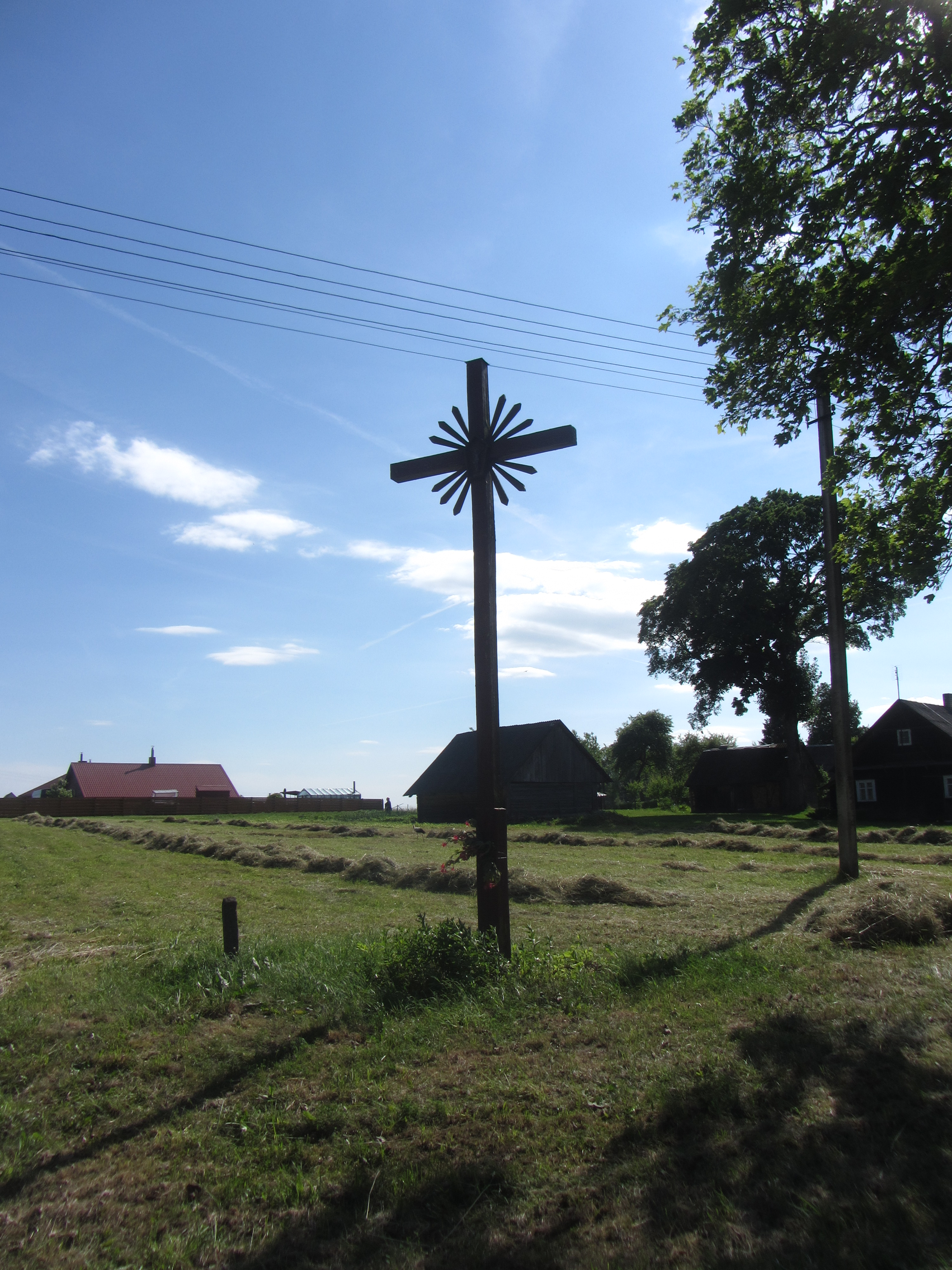 Bučiūnai, Lithuania